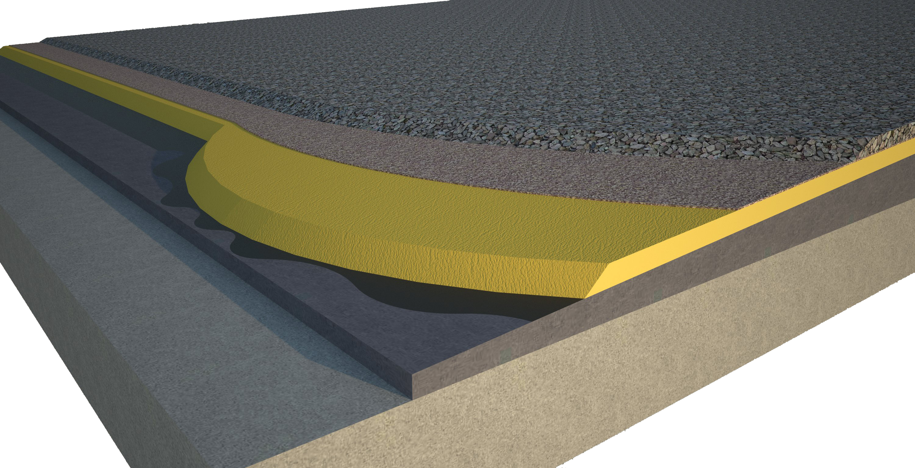 Poliuretano Proyectado. Cubierta Plana no Transitable